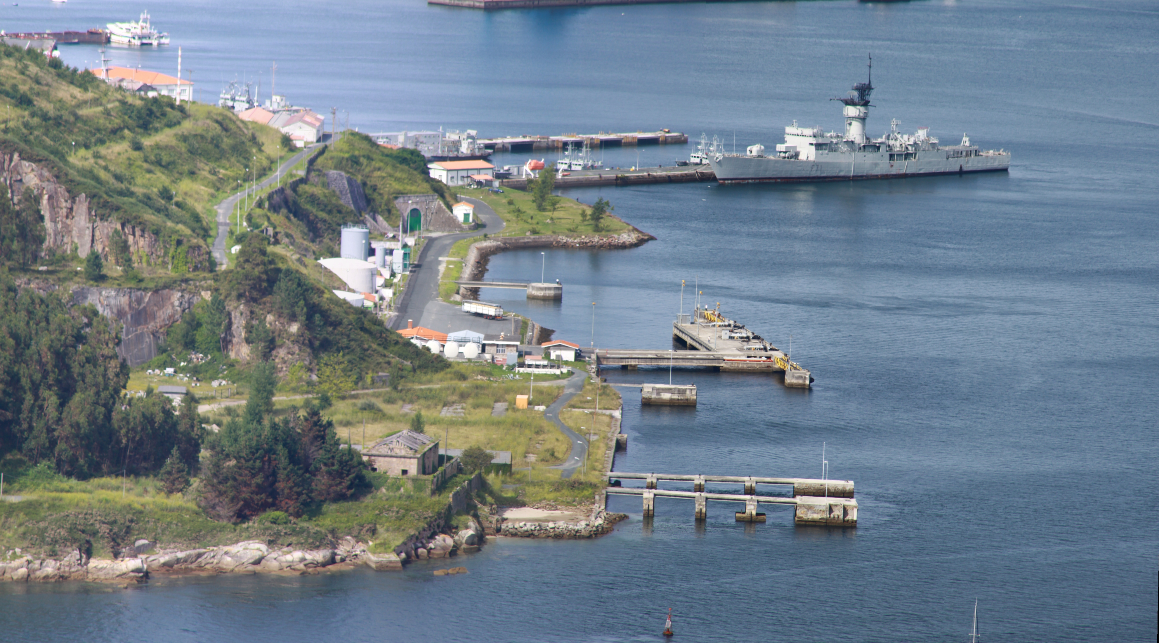 A Graña, Ferrol, Galiza. Na saída de Ferrol a Valdoviño, na comarca do mesmo nome, pertence ó concello de Ferrol.